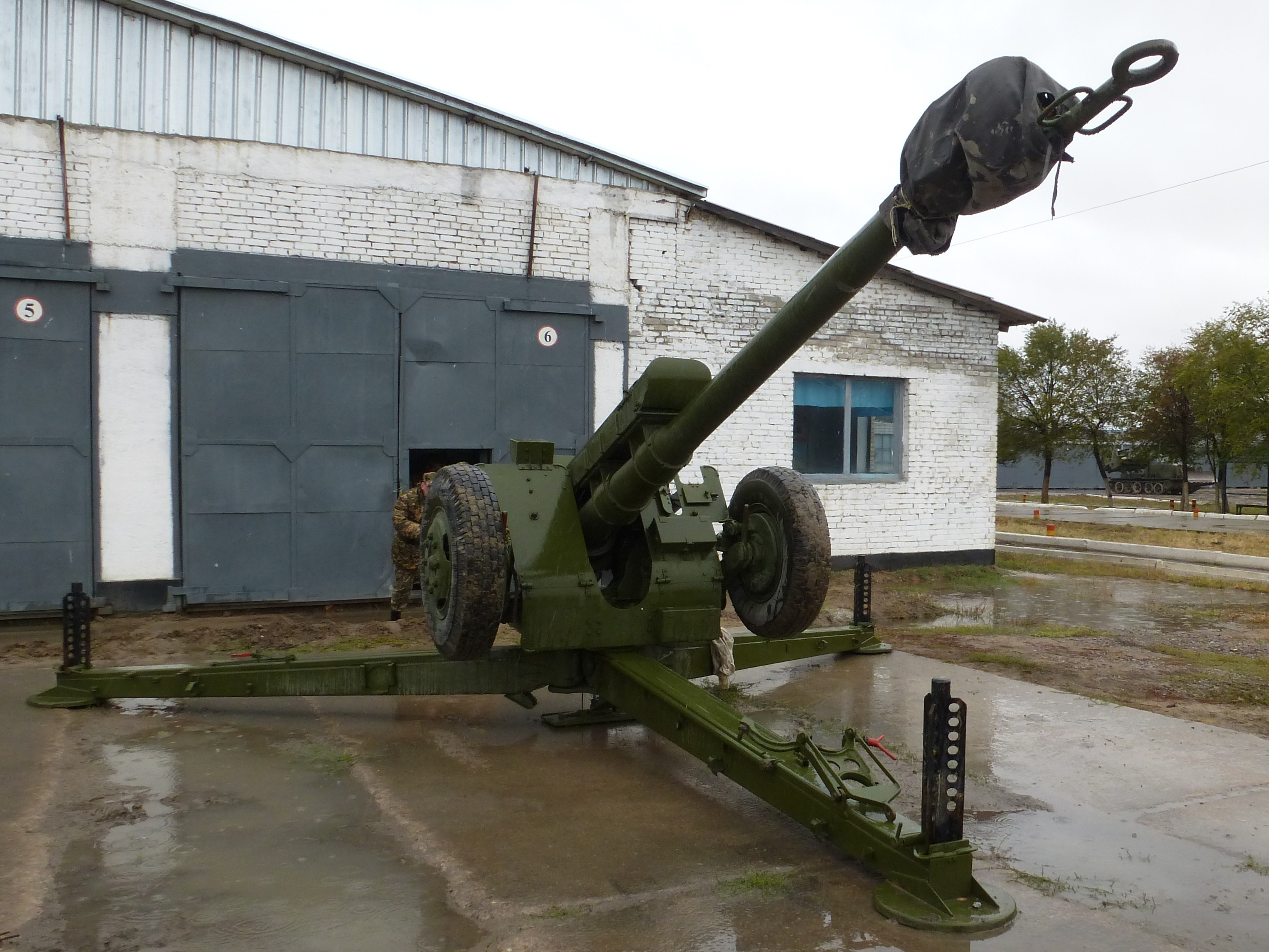 Д-30А с учебного полигона Алматинского Института Сухопутных Войск